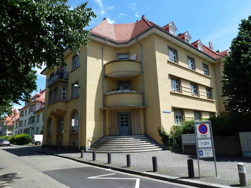 Siedlung am Fichteplatz in Mainz. Hier An der Philippschanze Ecke Nikolaus-Becker-Straße